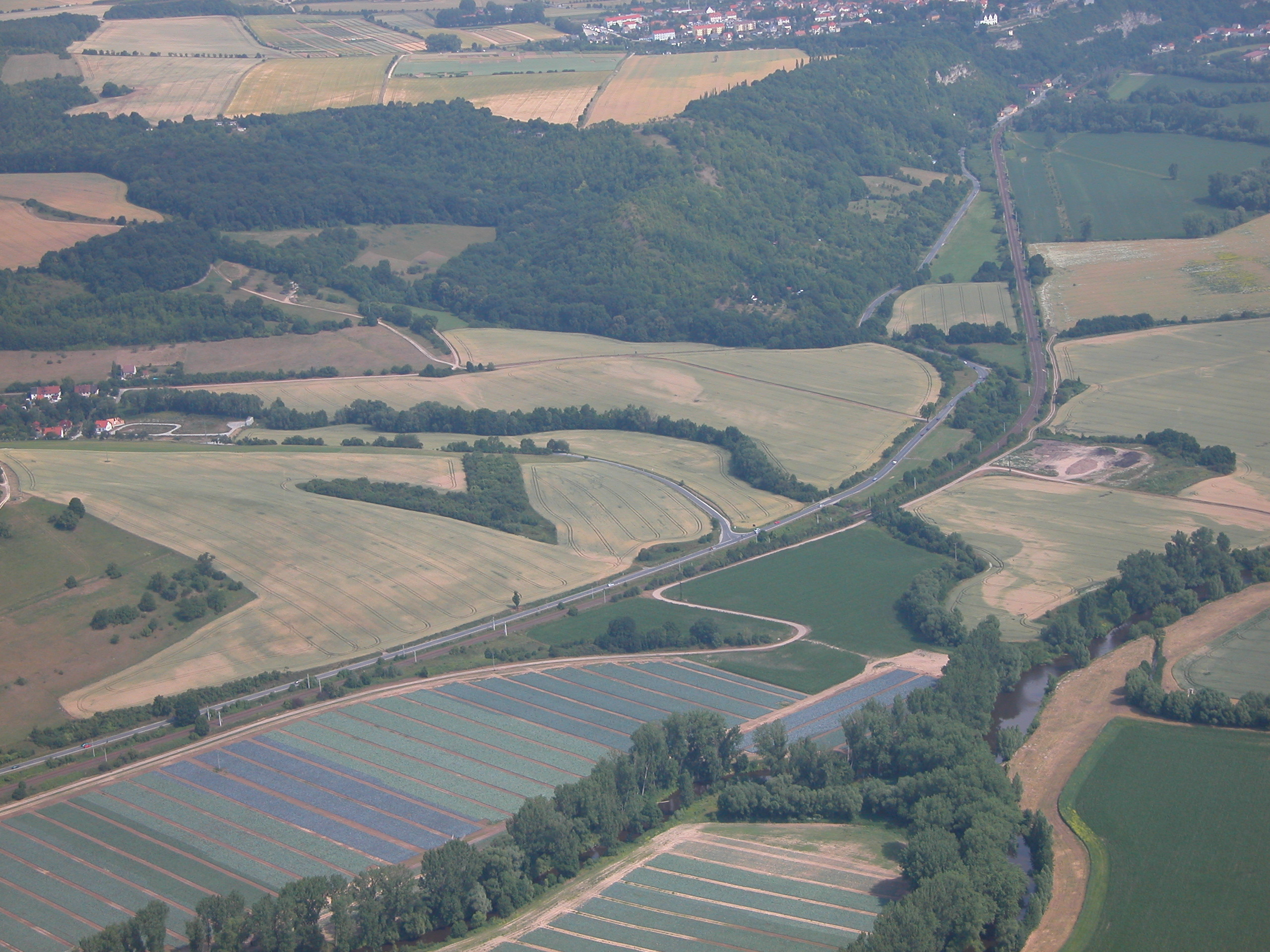 Luftbild des Saaletals zwischen Porstendorf und Dorndorf (Wüstung Hummelstedt), Abzweig nach Neuengönna (SHK)